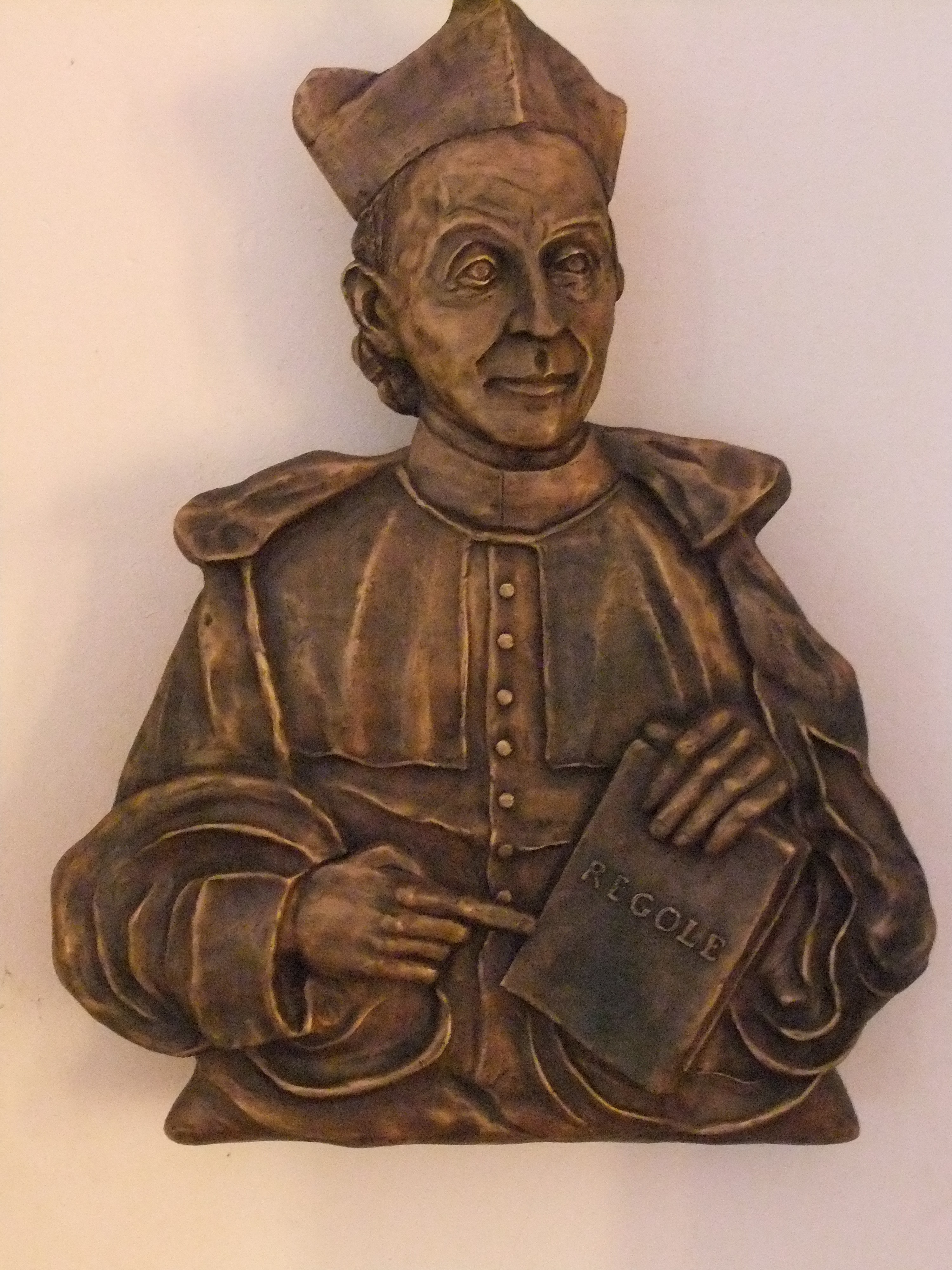 Carlo Steeb (Bronzeminiatur in der Michaelskirche [Hechniger Straße] in Tübingen; der Autor ist nicht angegeben)